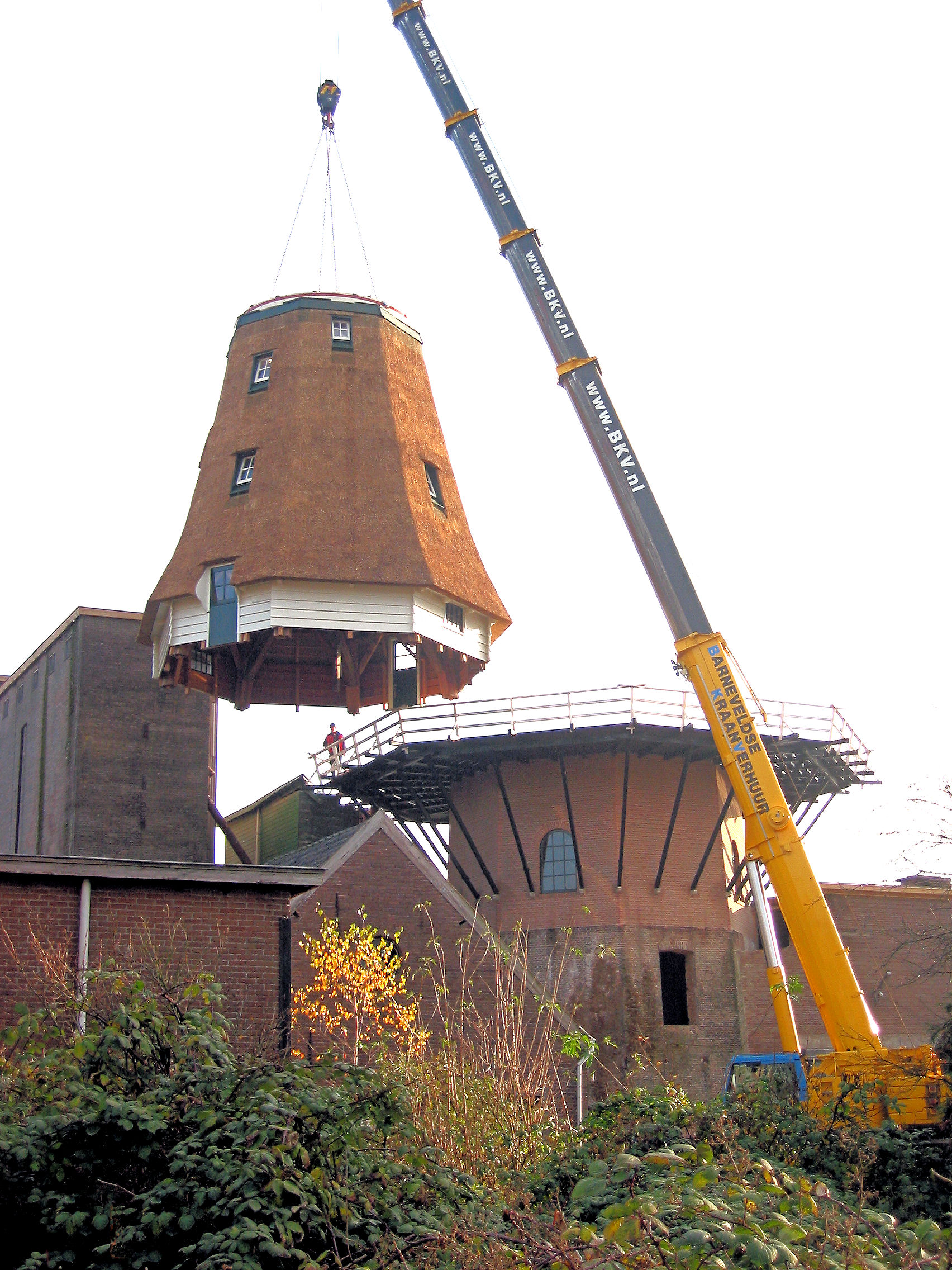 Ophijsen gerestaureerde houten achtkant van de Concordia molen te Ede 20 November 2007